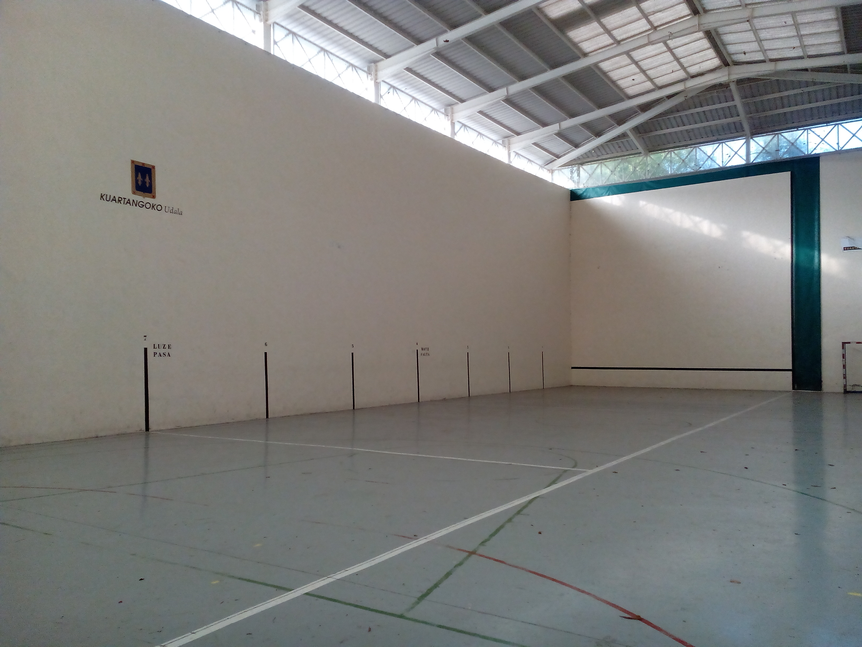 Kuartangoko pilotalekua